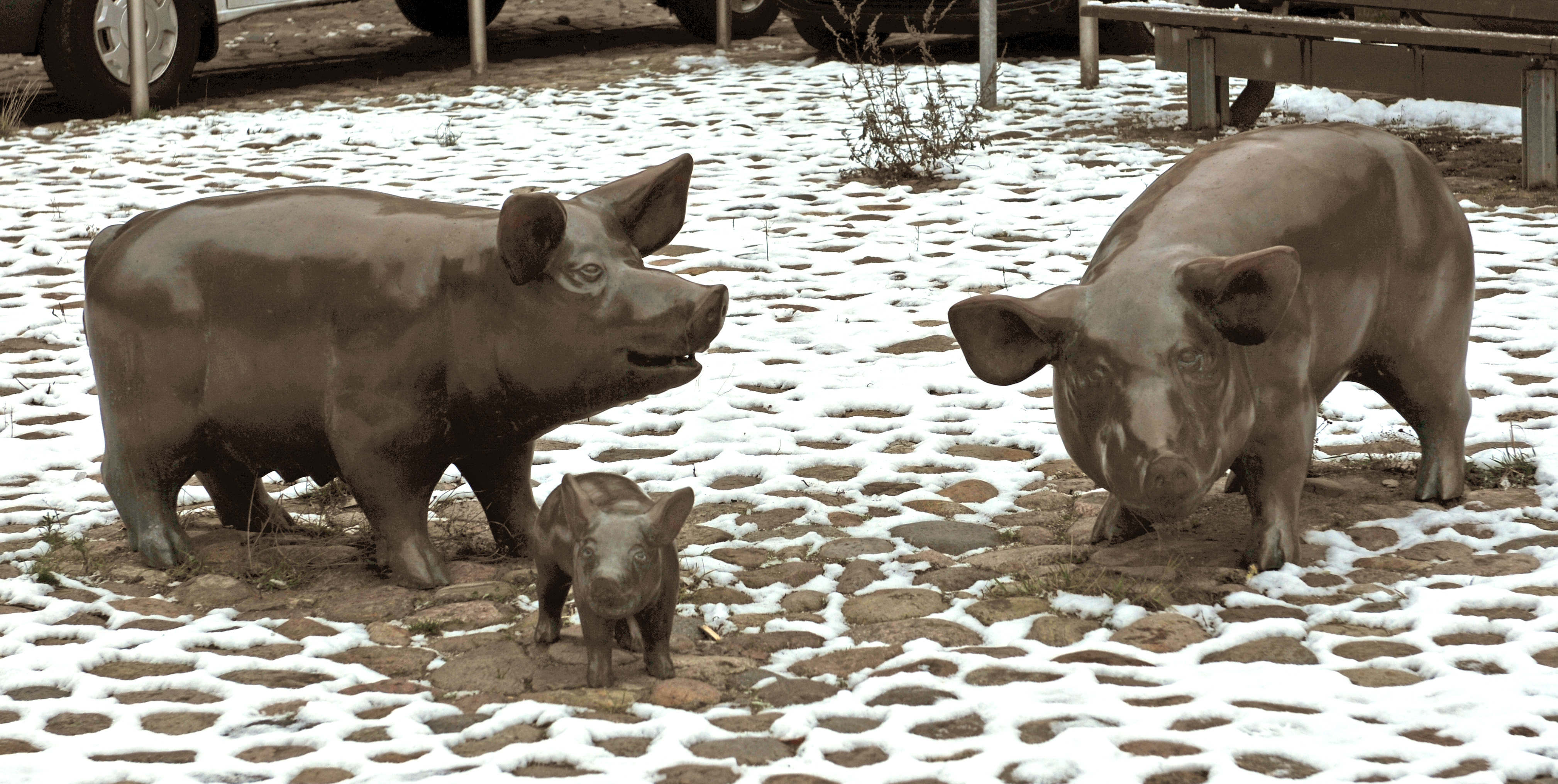 Schweine am Schweinemarkt in Schwerin von Hans-Werner Könecke